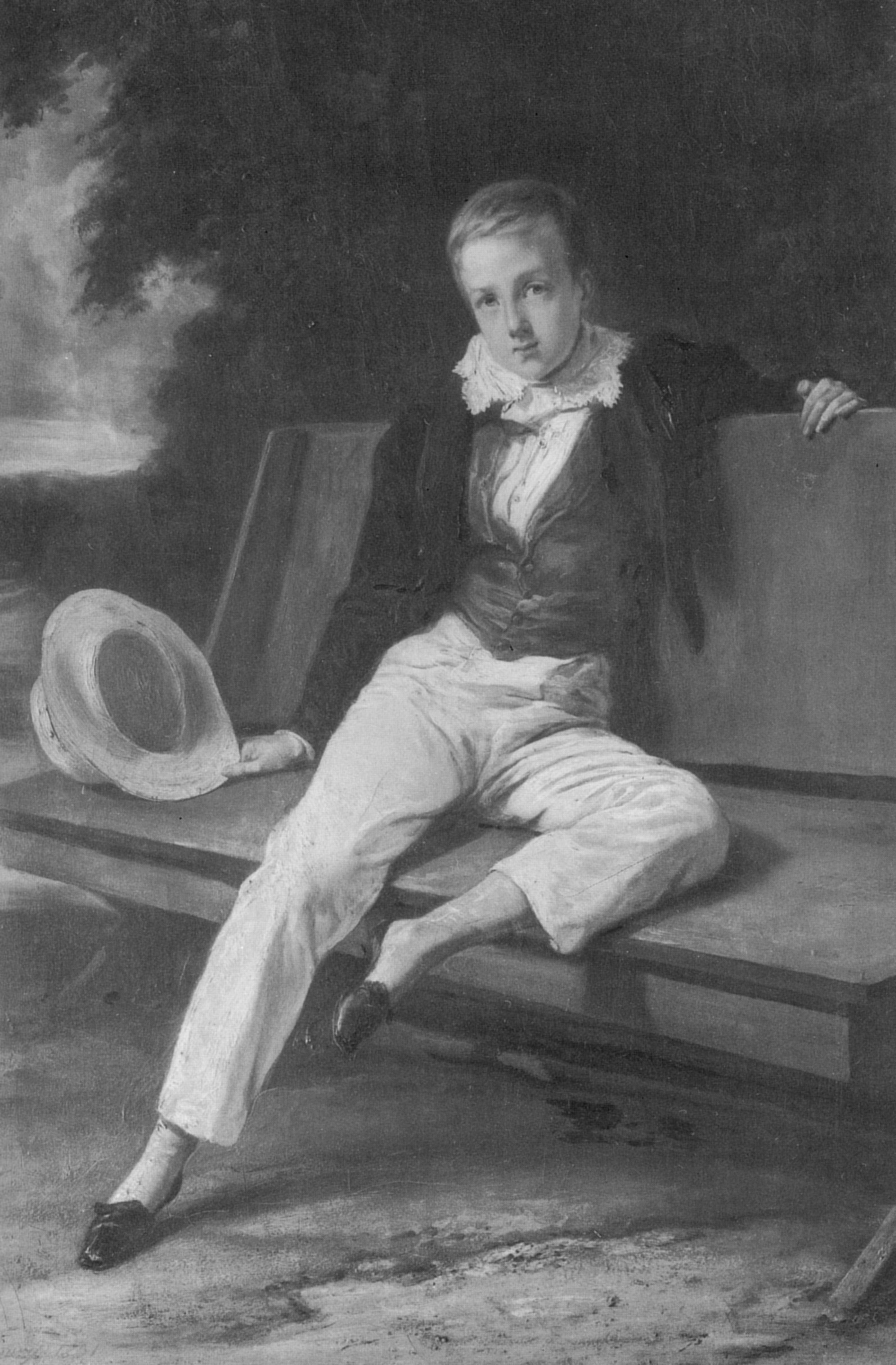 Porträt Henri-Eugène-Philippe-Emmanuels d’Orléans, Herzog von Aumale, im Alter von neun Jahren